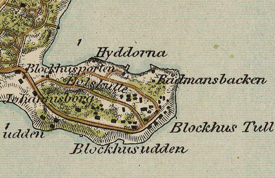 Del av trakten omkring Stockholm 1861 visande Blockhusudden